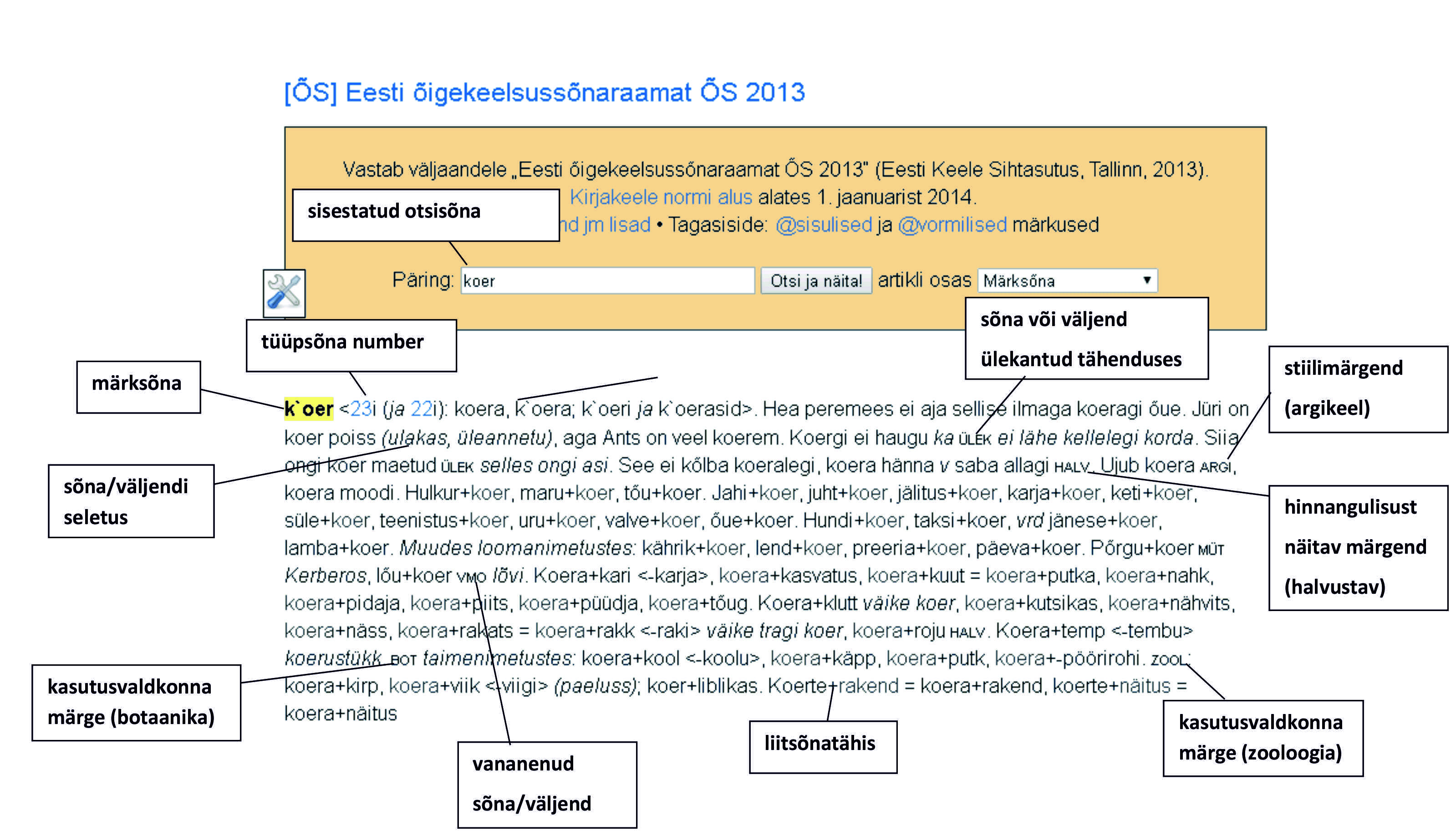 Abiks ÕSi kasutamisel